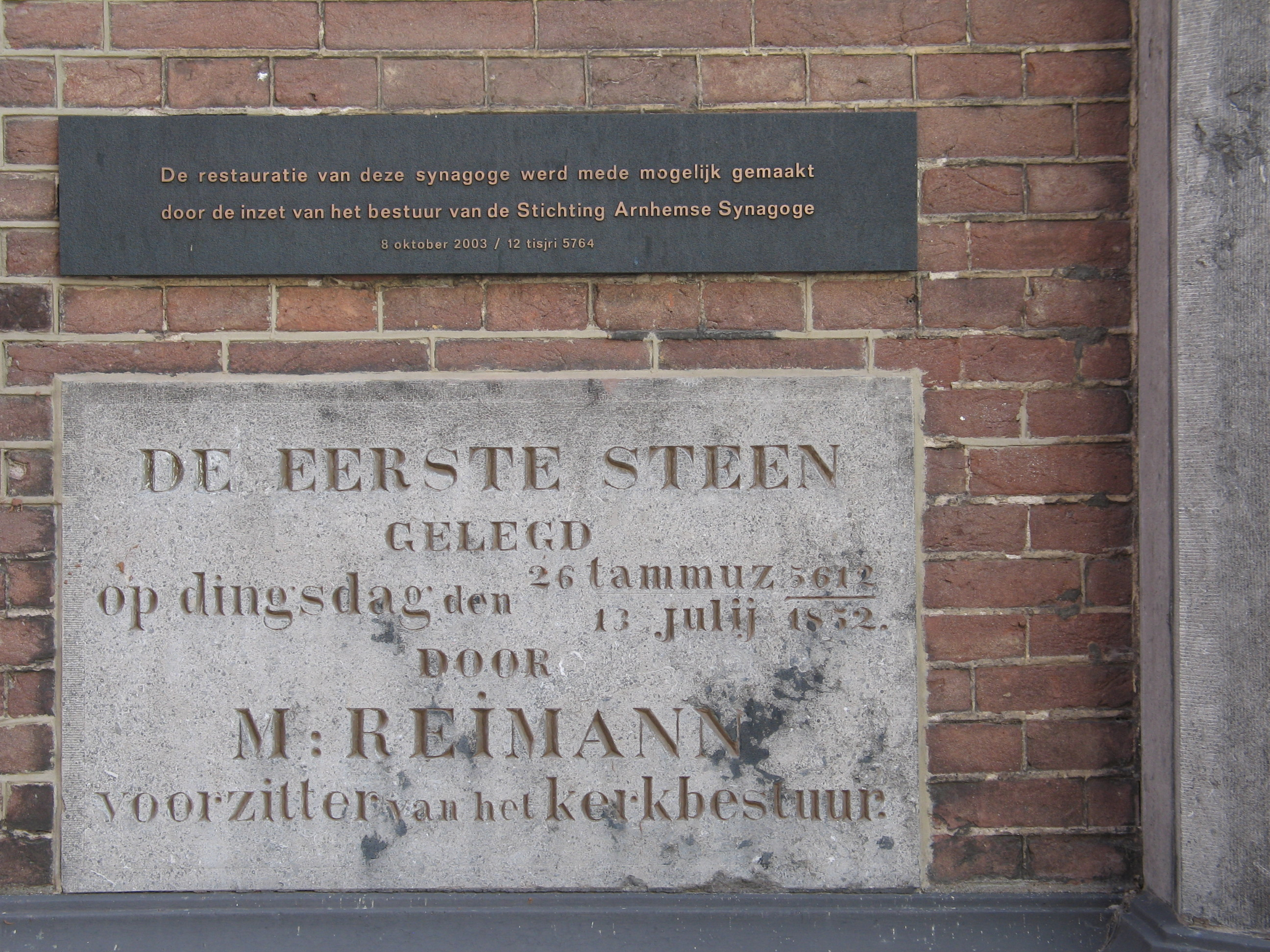 Arnhem, eerste steen van de synagoge (1853) aan de Pastoorstraat 17A